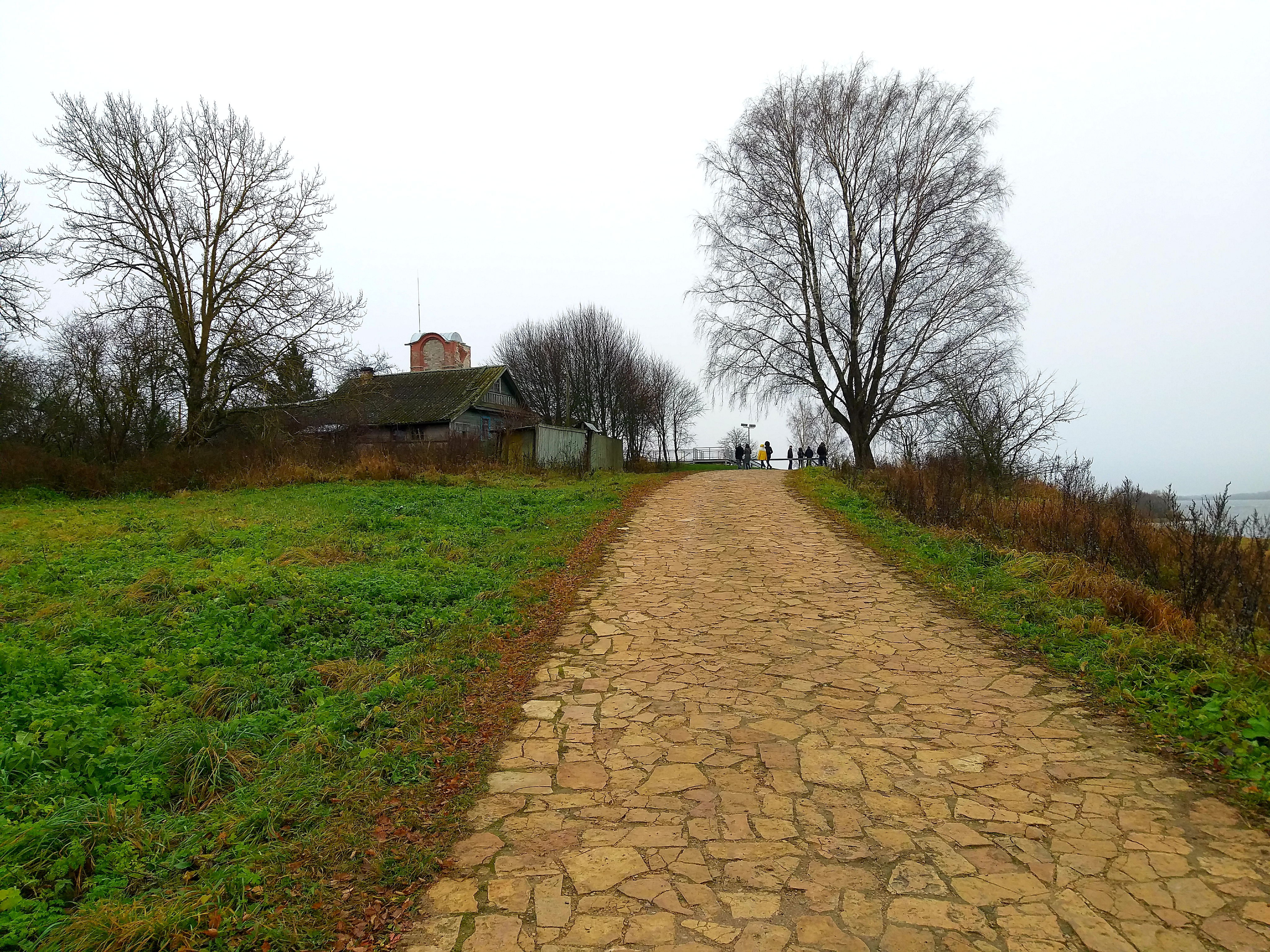 Восстановленная дорога и жилые дома на Рюриков городище